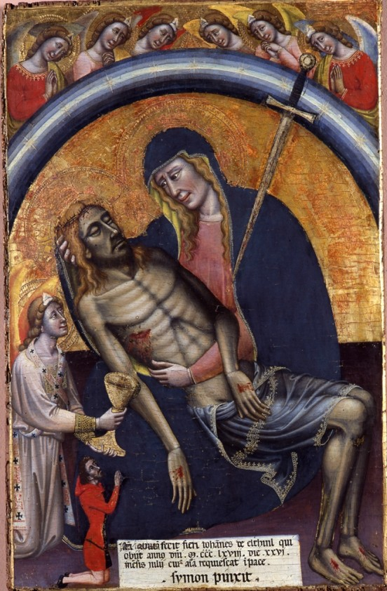 Cristo in pietà et il donatore Giovanni di Elthinilabel QS:Lit,"Cristo in pietà et il donatore Giovanni di Elthini"label QS:Lfr,"Simone de Filippo (dit Simone dei Crocefissi), Christ en pietà et le donateur Giovanni de Elthini"